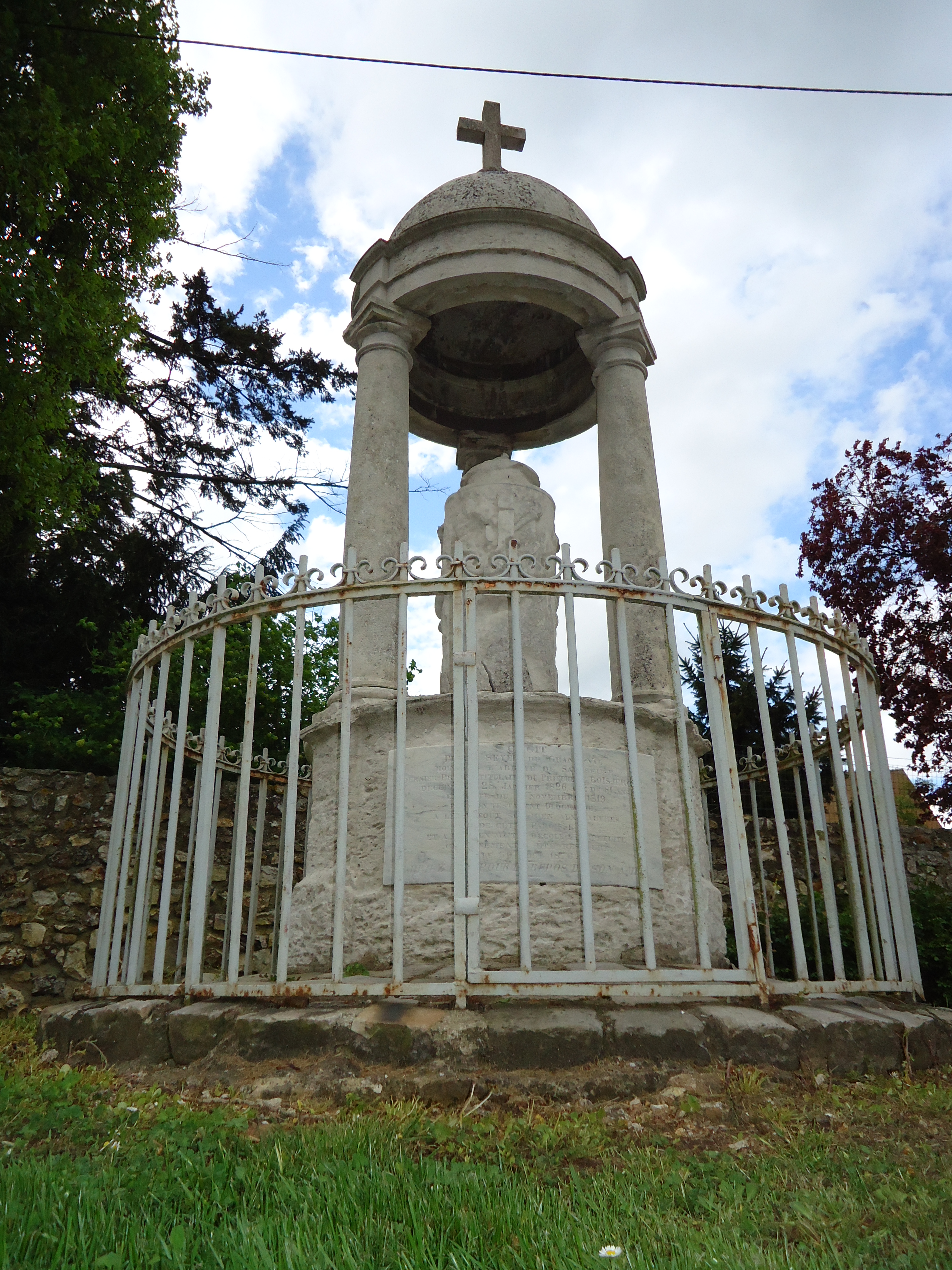 Monument funéraire de Pierre Seyer - Bois-Jérome-Saint-Ouen - Eure (27)